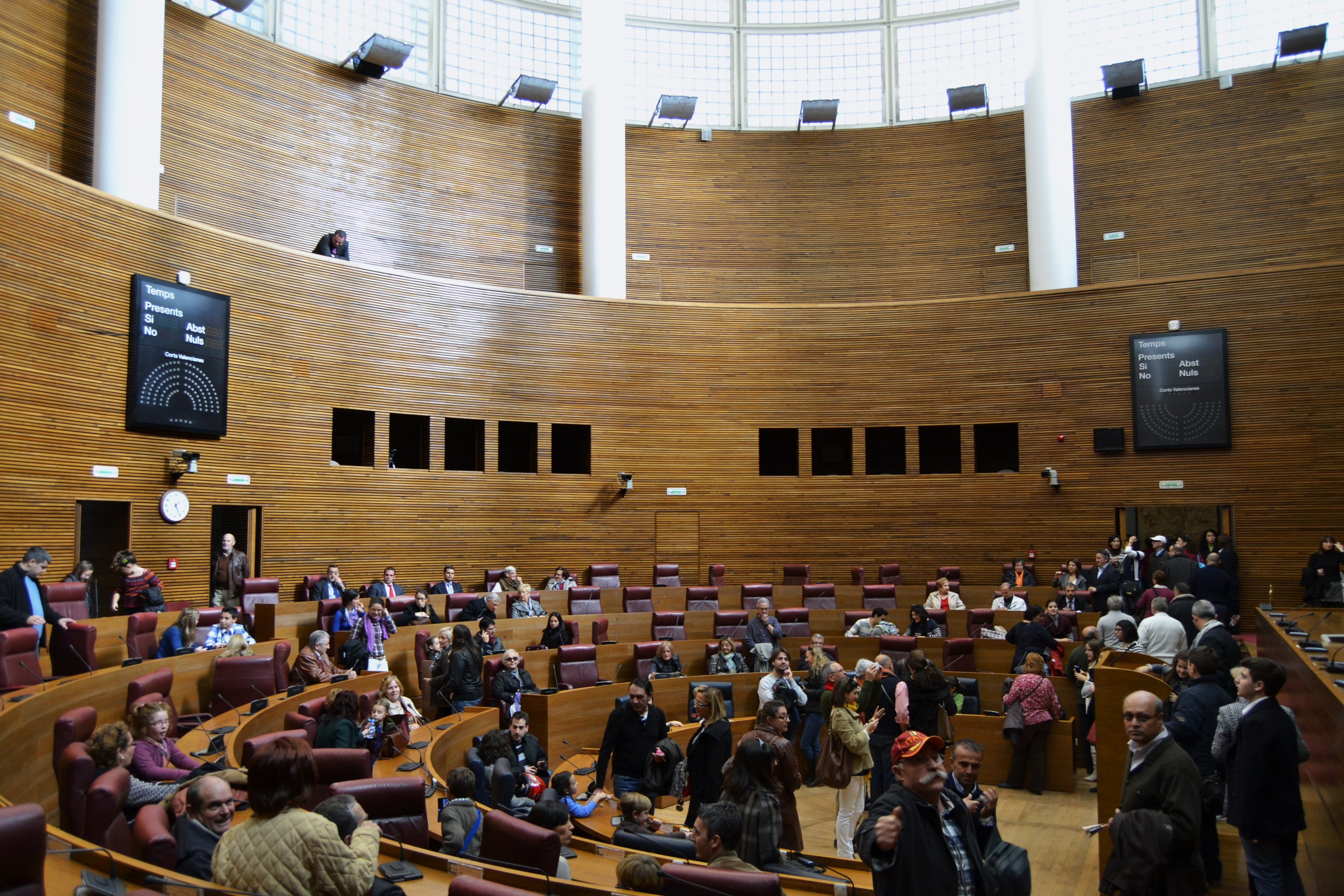 Hemicicle de les Corts Valencianes.